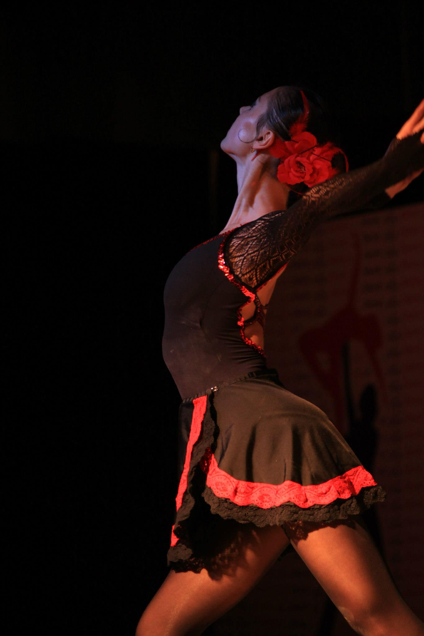 bailaora de flamenco